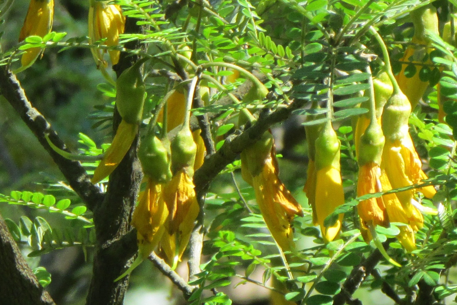 Floración de Sophora fernandeziana